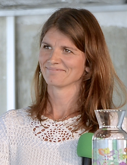 Jenny Madestam, statsvetare, i Ekots lördagsintervju inför valet i september. 30 augusti 2014 på Kulturhuset i Stockholm.